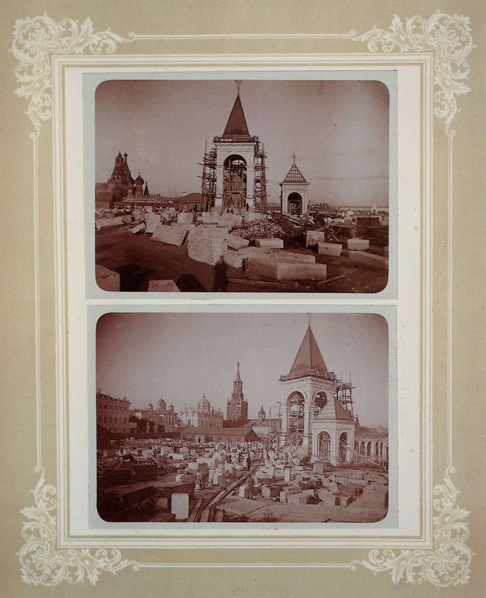 Nasvetevič, Aleksandr Aleksandrovič: Bau des Denkmals für Aleksandr II. im Kreml, Moskau